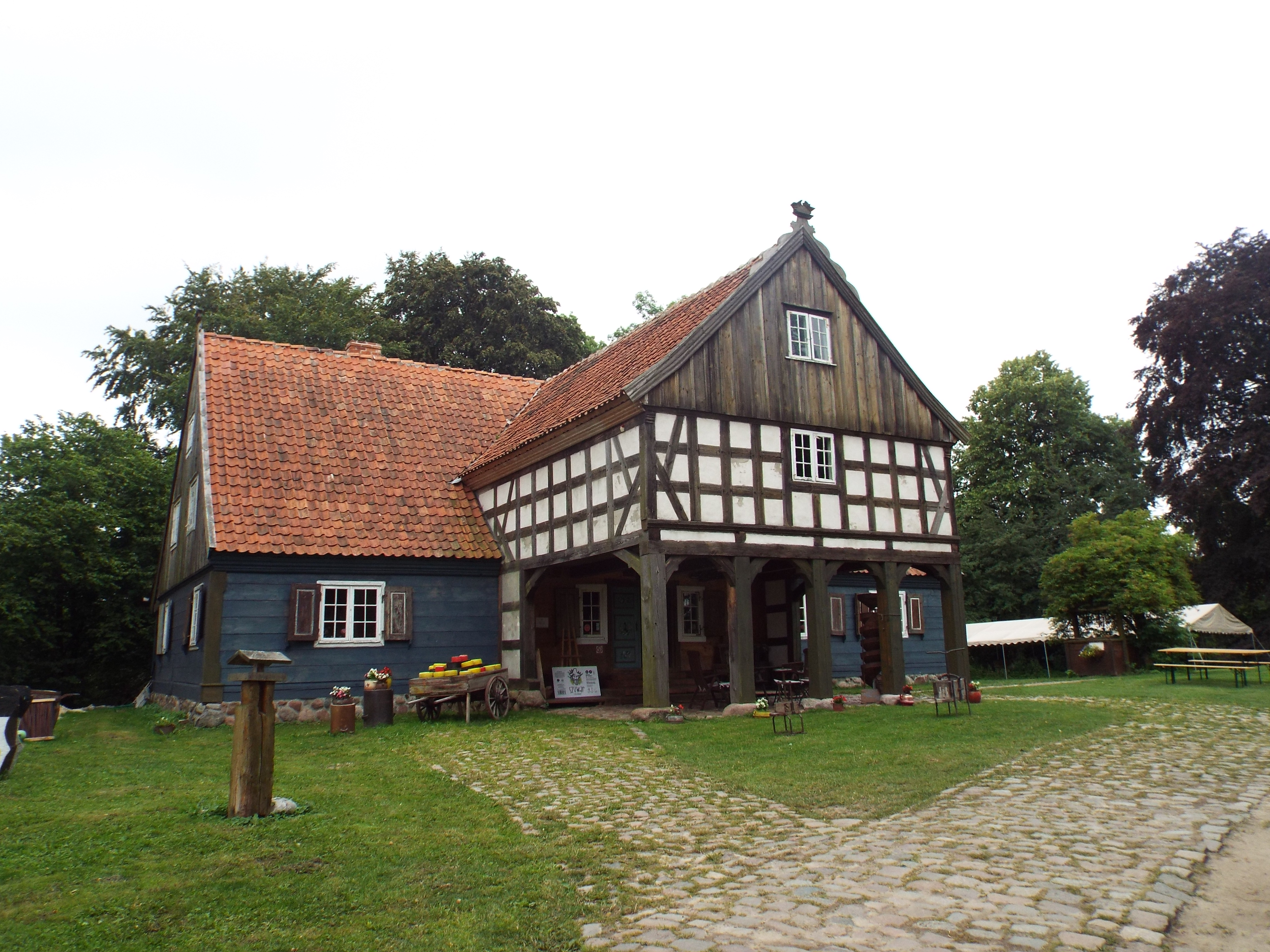 Меноніцький підтіньовий будинок в Желіхово-Циганку. Фото Івана Парнікози, 2019 р.